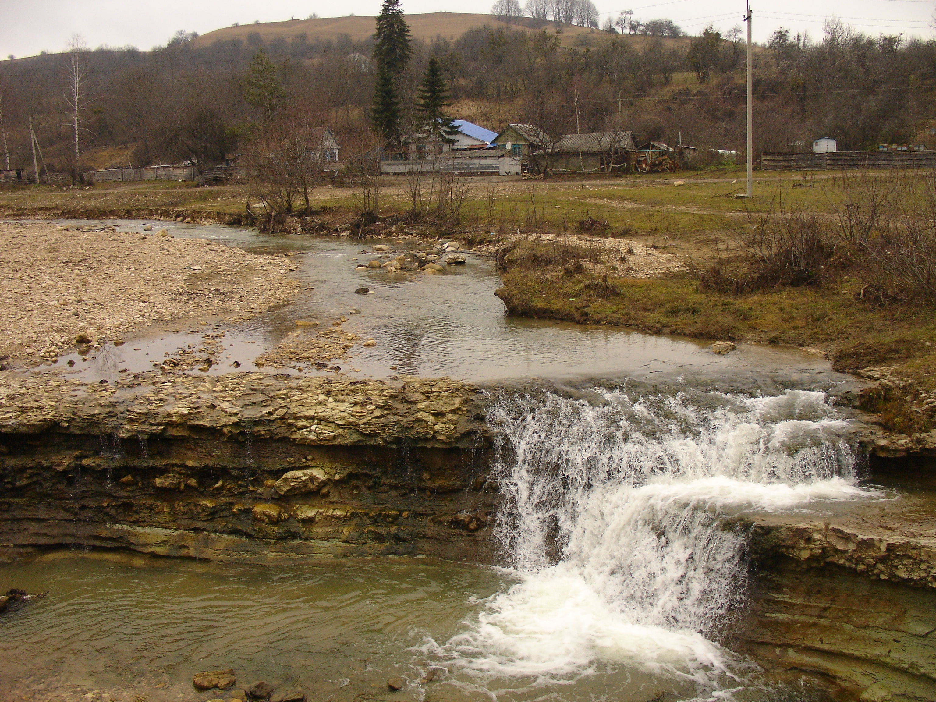 Баракаевская, Мостовской район, Краснодарский край. Водопад на речке